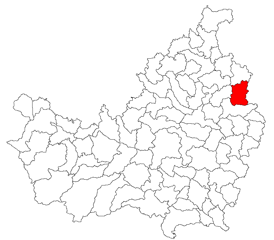 Categorie:Hărţi ale judeţului Cluj